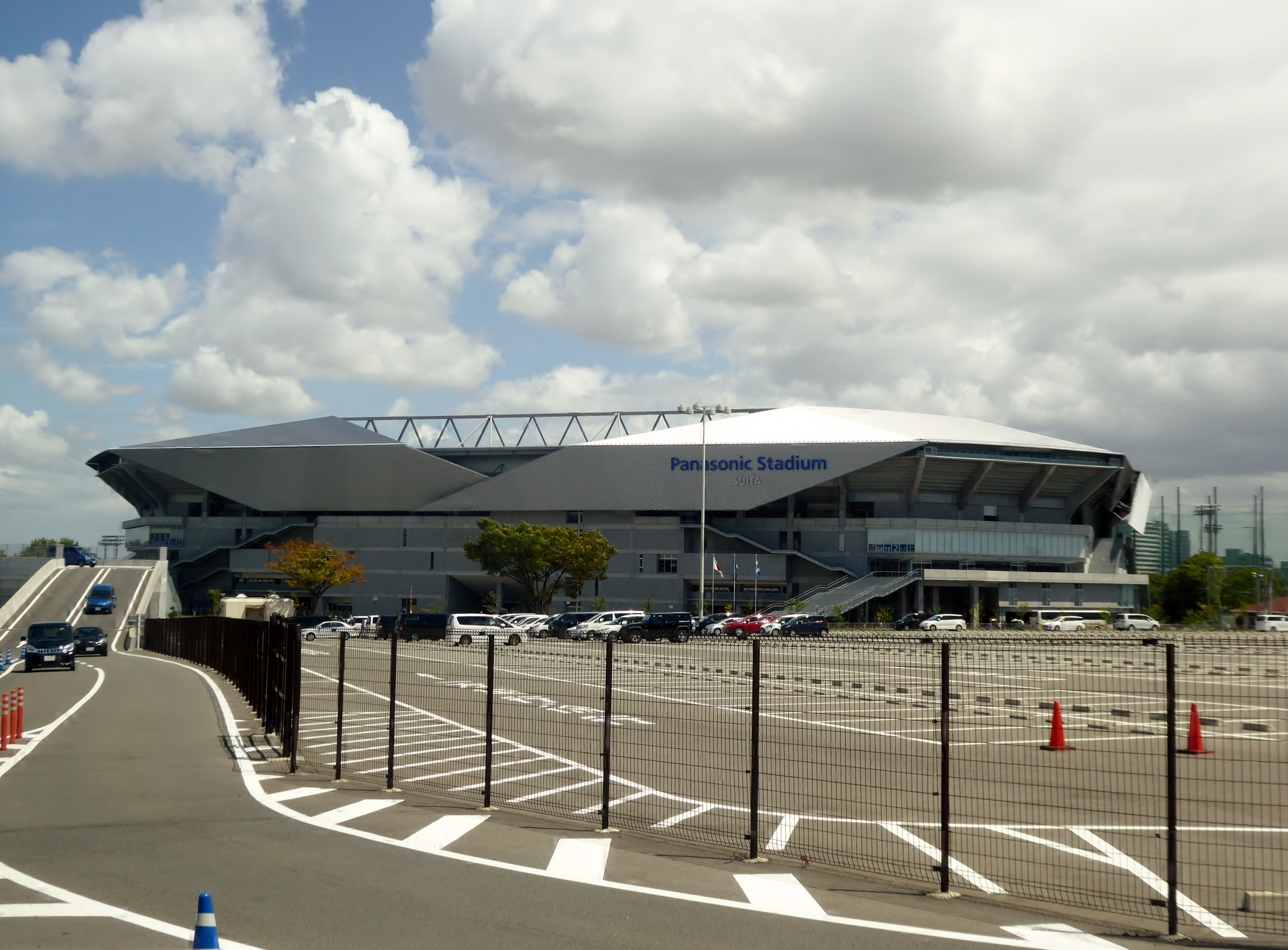 市立吹田サッカースタジアムを撮影。 Panasonic Lumix DMC-TZ60